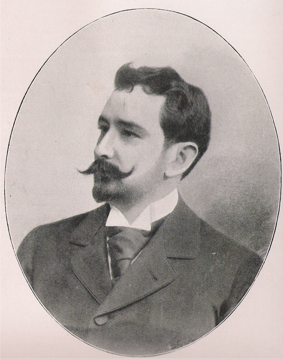 Fotografía del Gobernador de Tucumán Dr. Próspero Mena desde 1898 hasta 1901